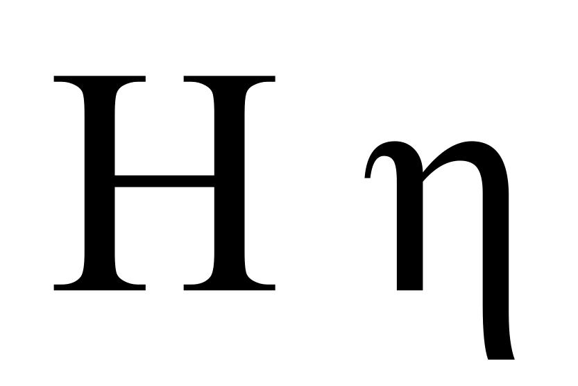 greek letter eta